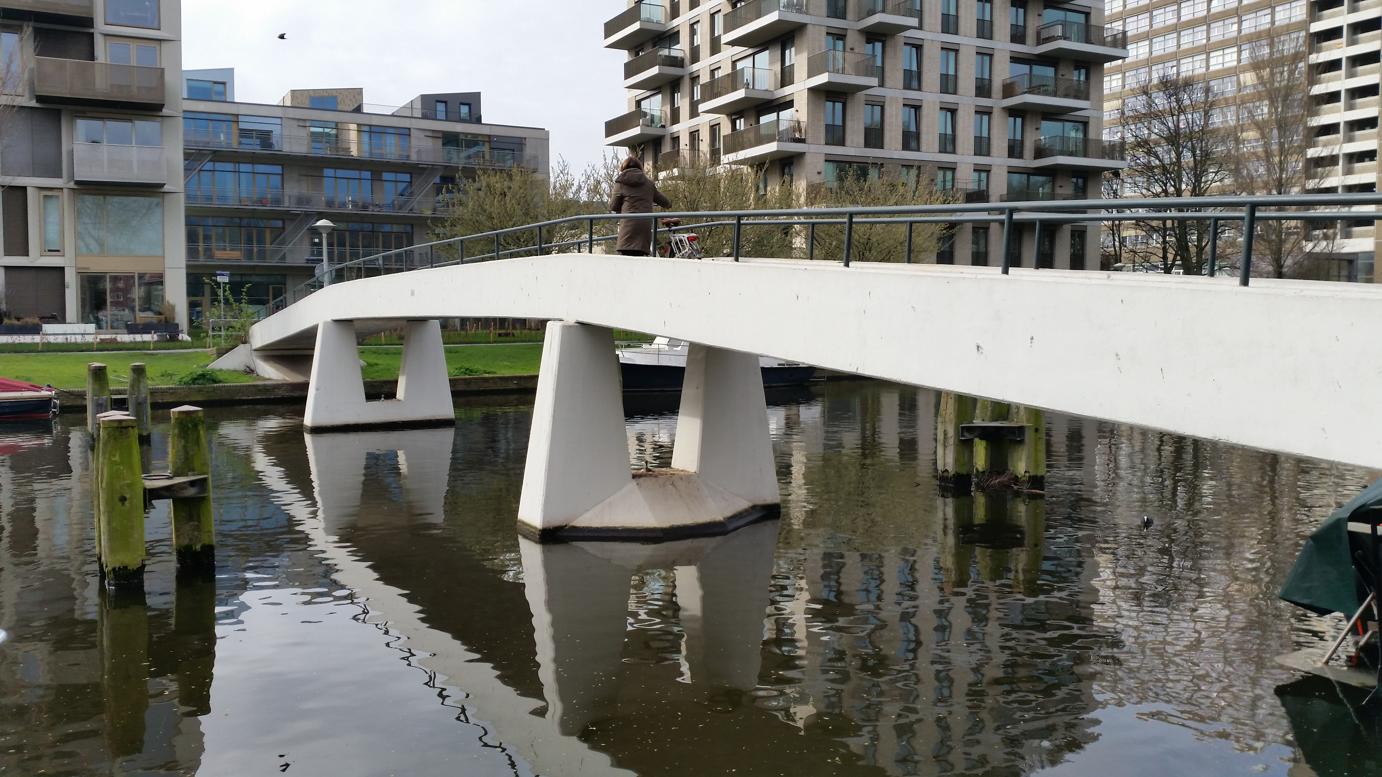 Zijaanzicht van Brug 392 (in Amsterdam)